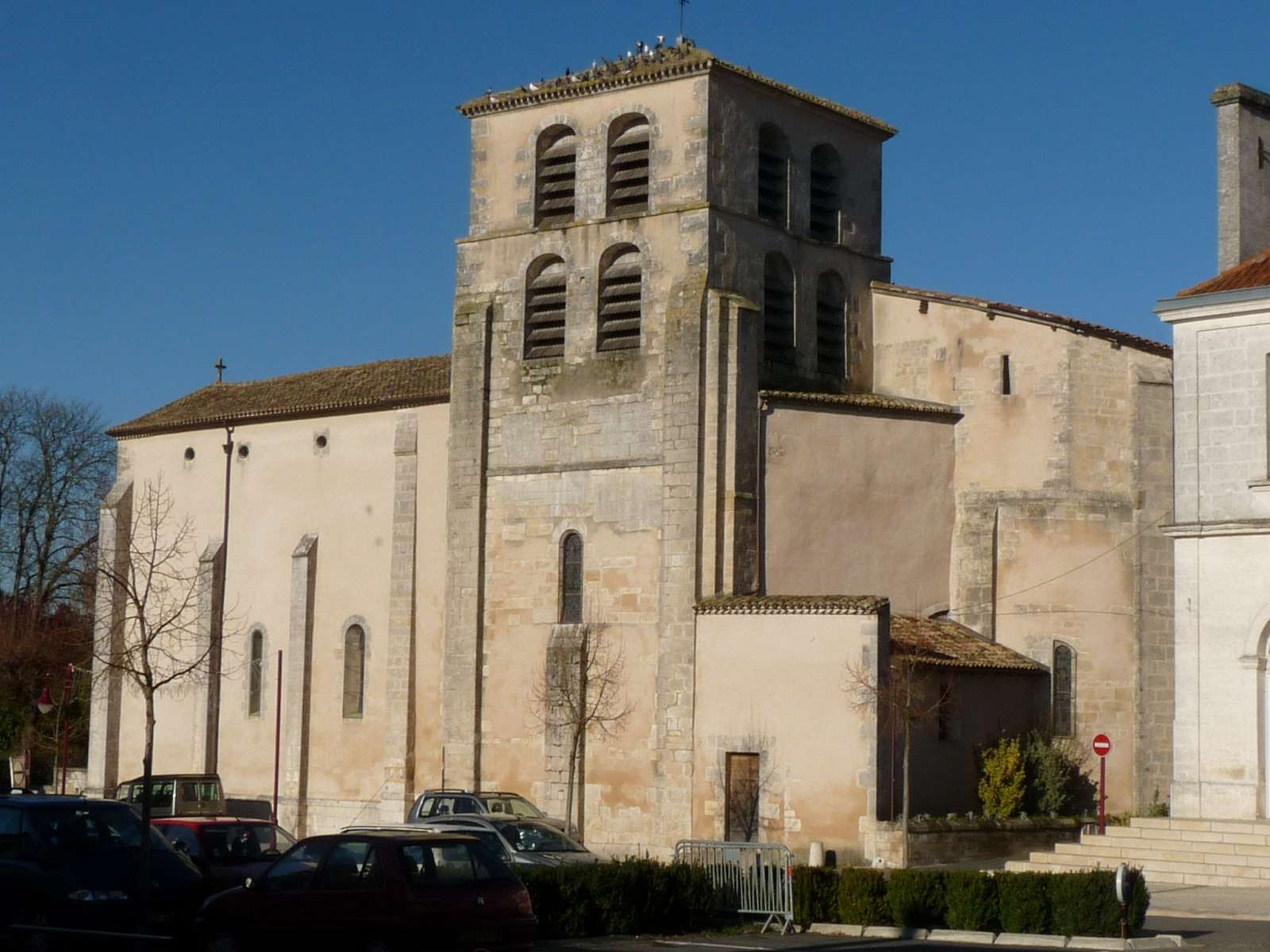 église de Vars, Charente, France